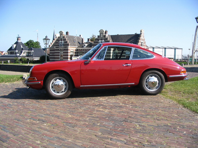 Robijnrode (rubyred) Porsche 912, de auto is gebouwd in 1965 (Eigen foto, niet beschermd door auteursrecht, vrij te gebruiken)